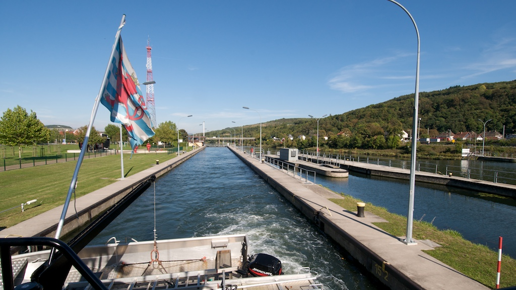 Muselschleis Gréiwemaacher. Kategorie:Schëffsschleisen Kategorie:Musel Kategorie:Kuckeswäertes am Kanton Gréiwemaacher Kategorie:Barragen Kategorie:Hydroelektresch Zentralen Kategorie:Gemeng Gréiwemaacher